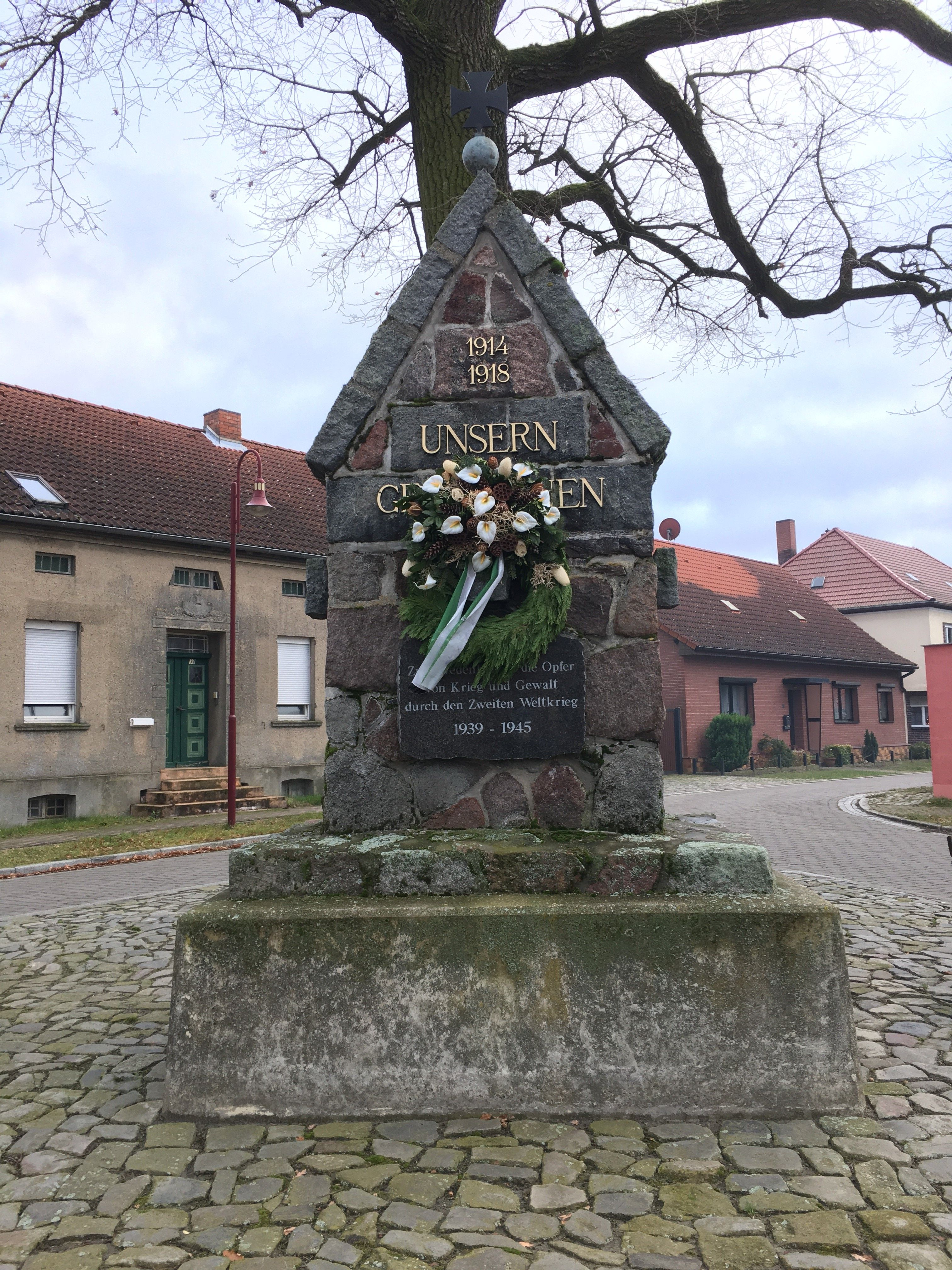 Kabelitz, Gemeinde Wust-Fischbeck, Gefallenendenkmal Erster Weltkrieg